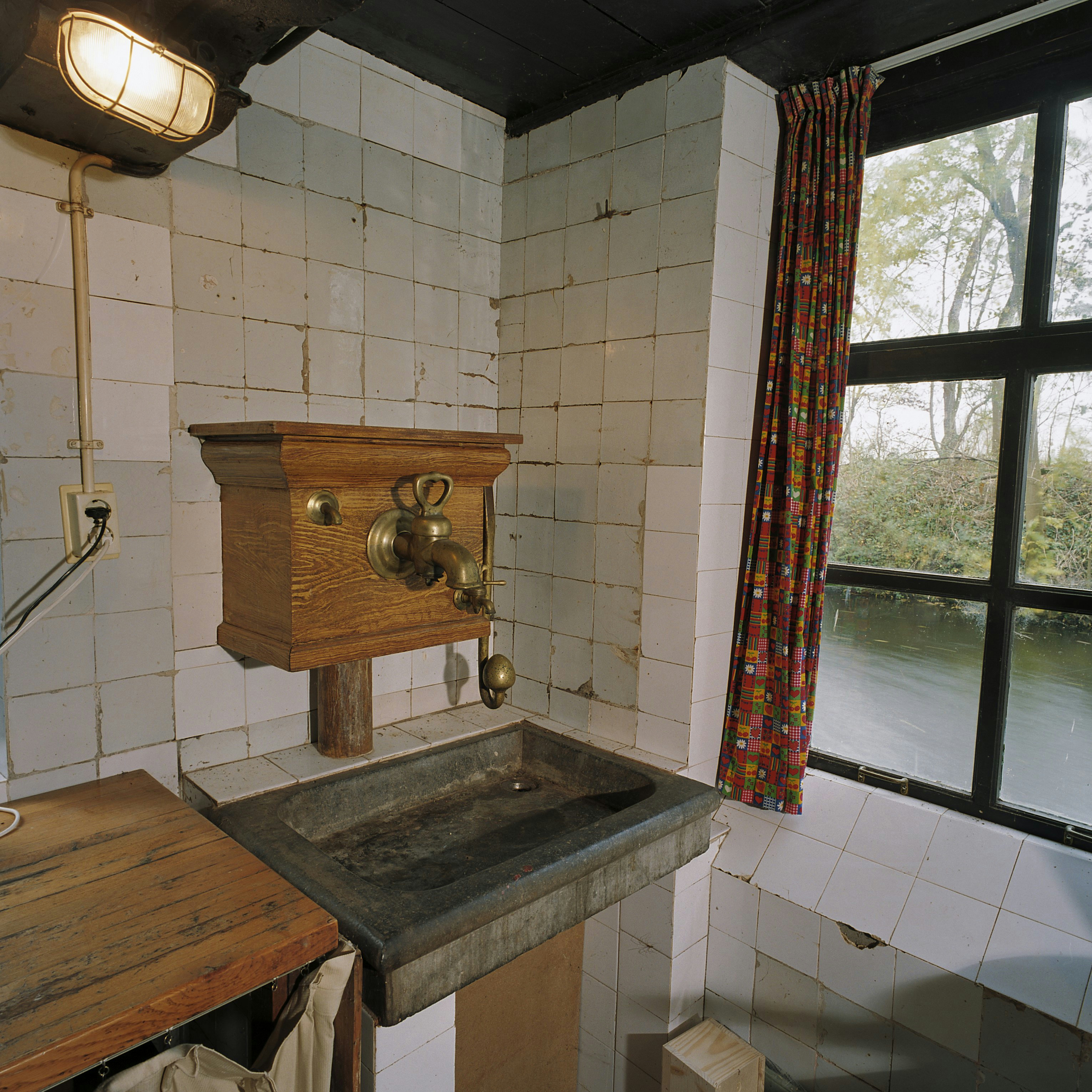 Allersmaborg: Interieur, waterpomp in de kelder